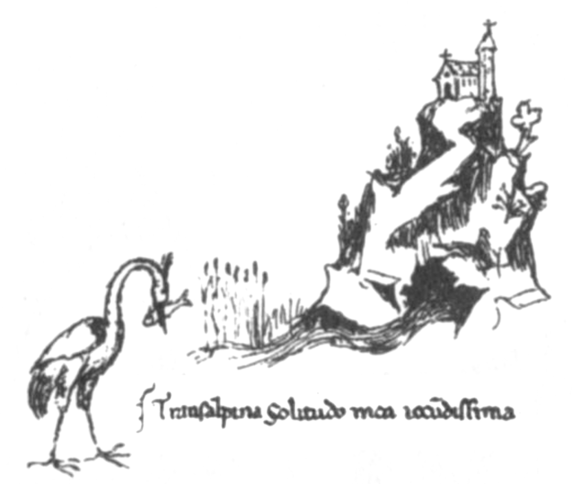 Fontaine de Vaucluse - Dessin de Pétrarque (manuscrit de Pline) BN fonds latin n° 6802